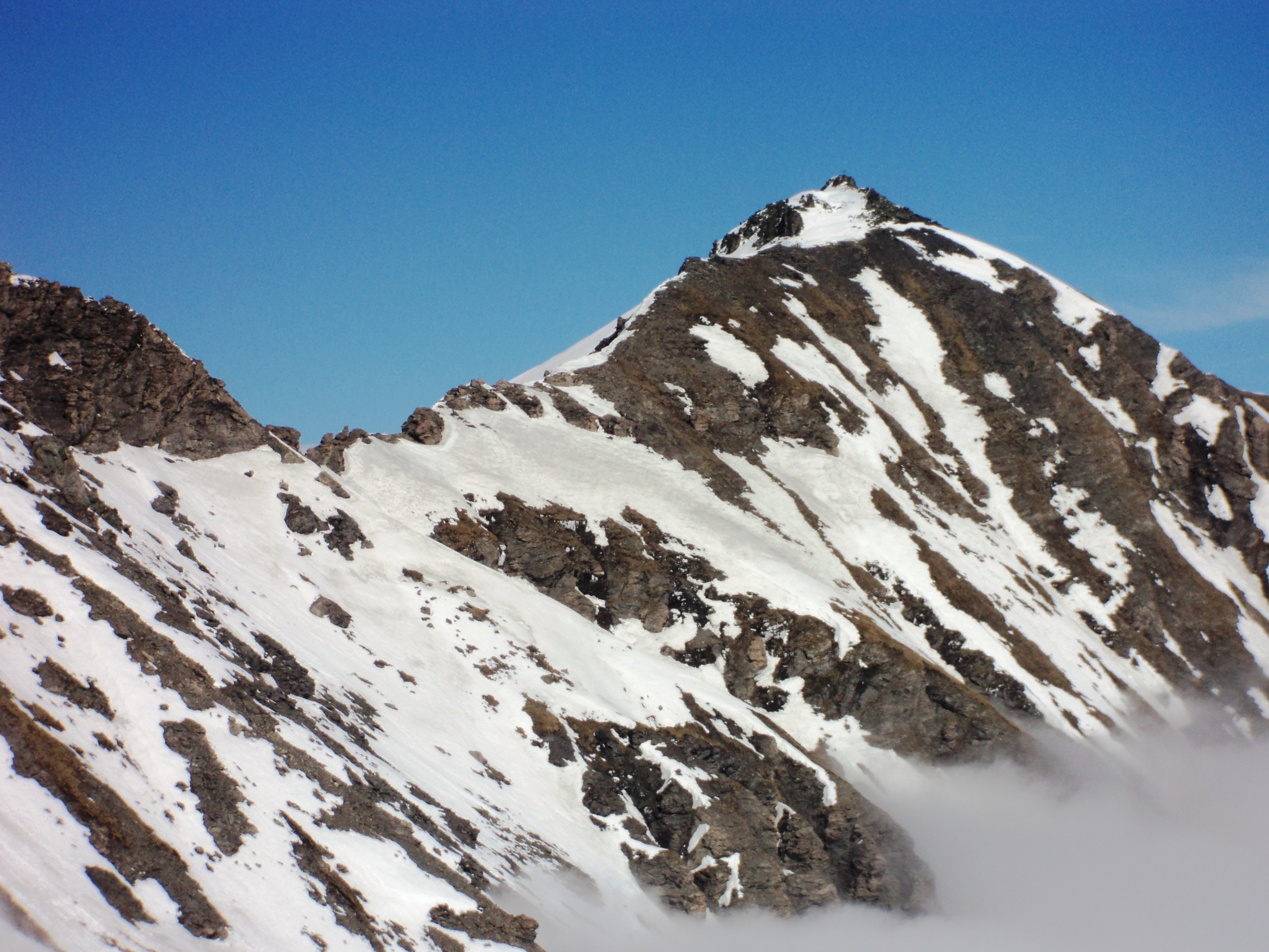 Il monte Albergian visto dal Colle dell'Albergian